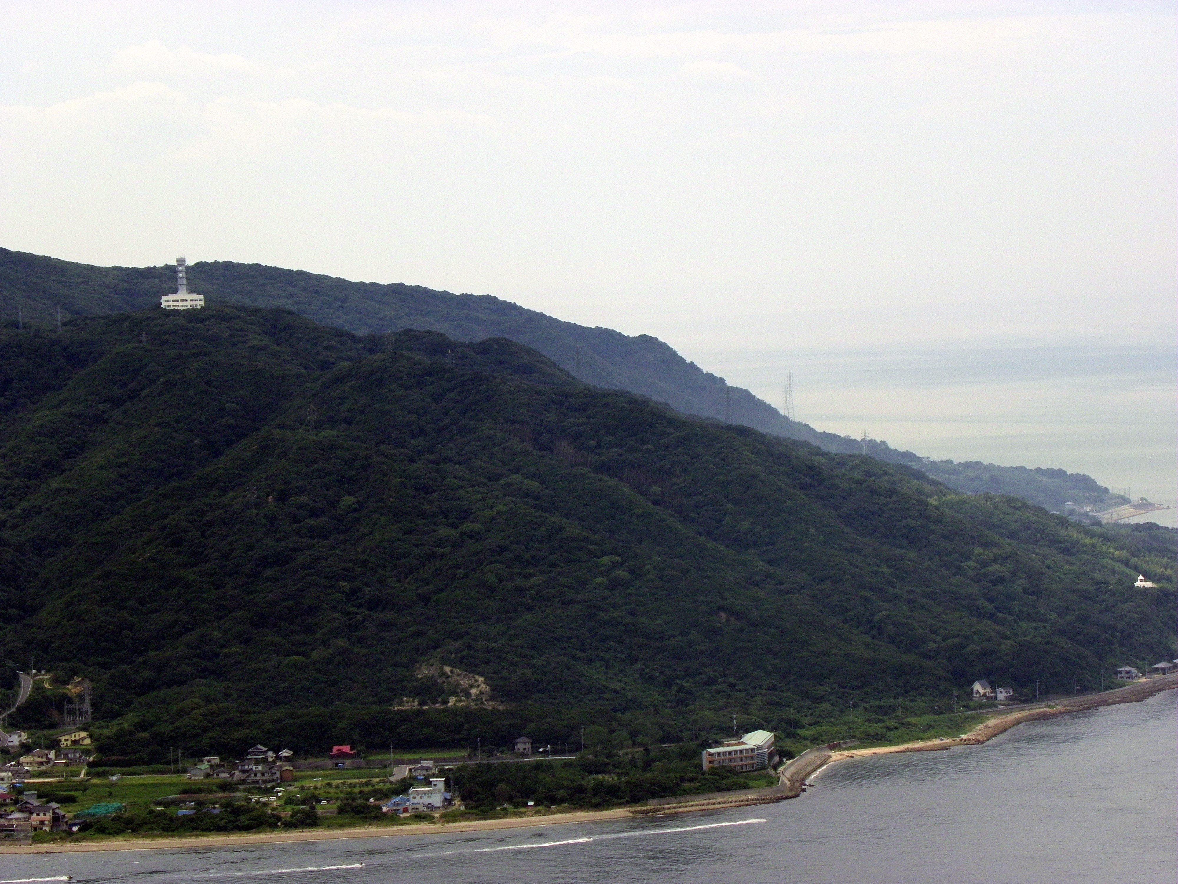 大阪マーチスと江埼灯台